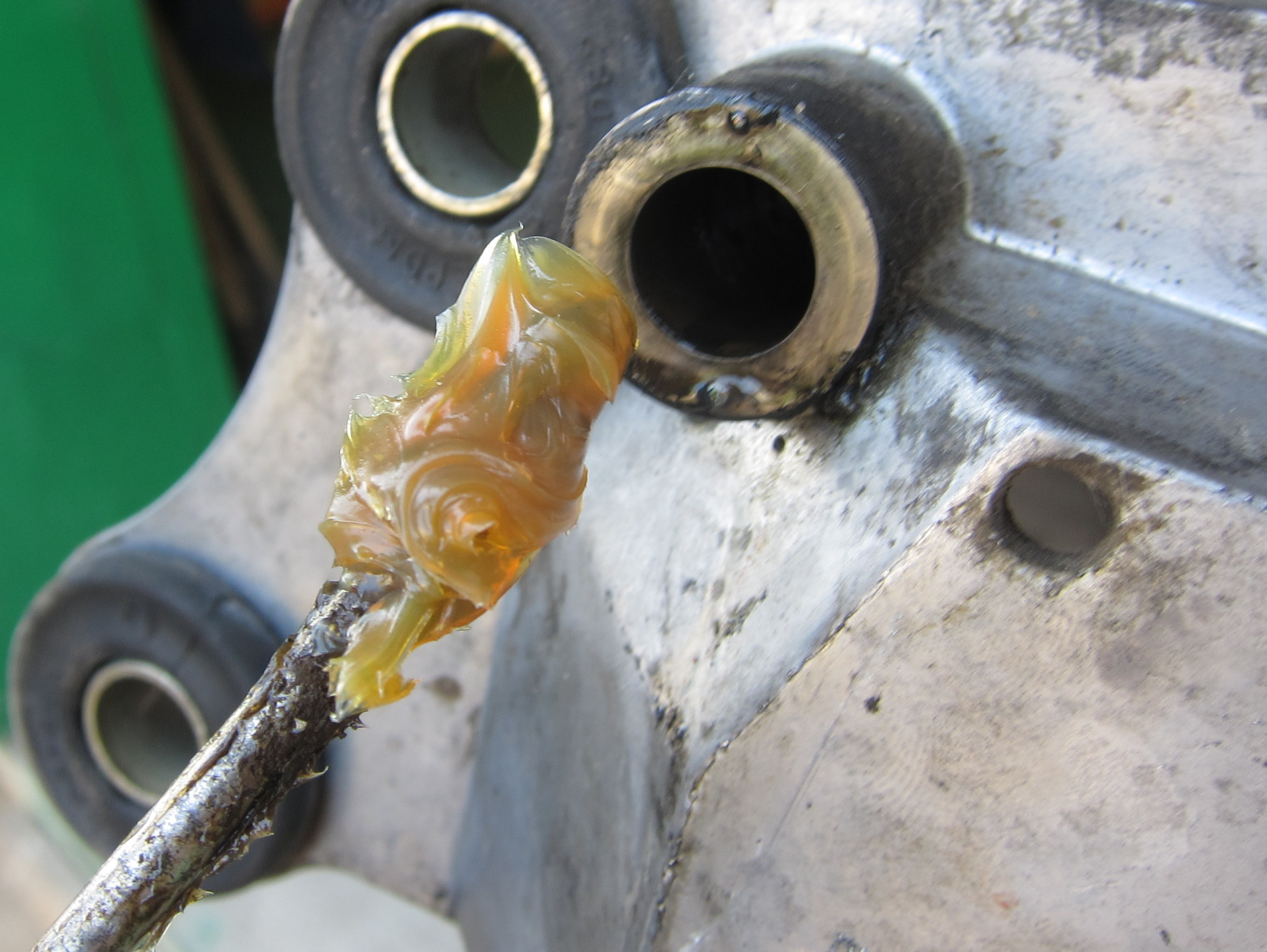 Литол 24